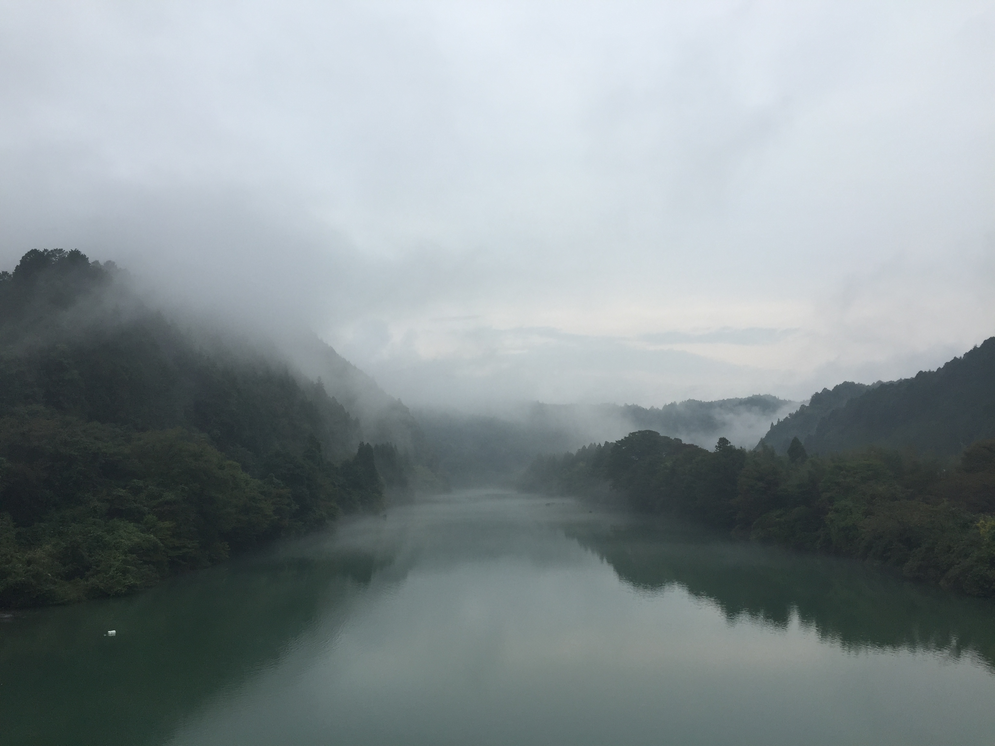 雨の藤倉峡を七宗ダムより望む